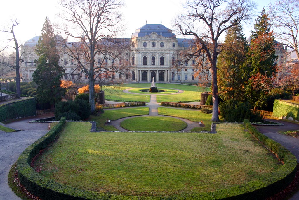 Hofgarten der Residenz Würzburg, Foto: Canon EOS 300D